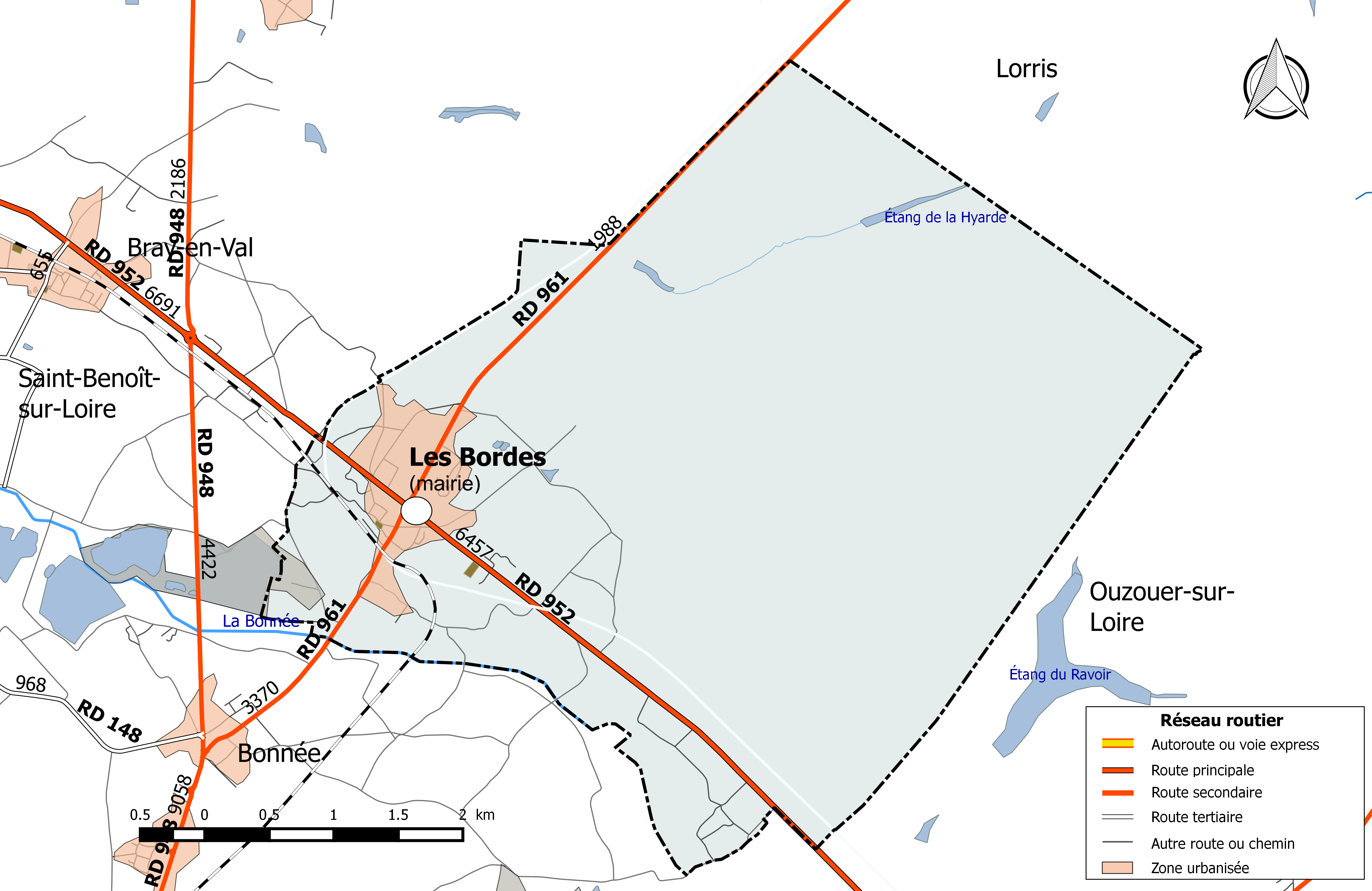 Carte du réseau routier de la commune de Les Bordes (Loiret).